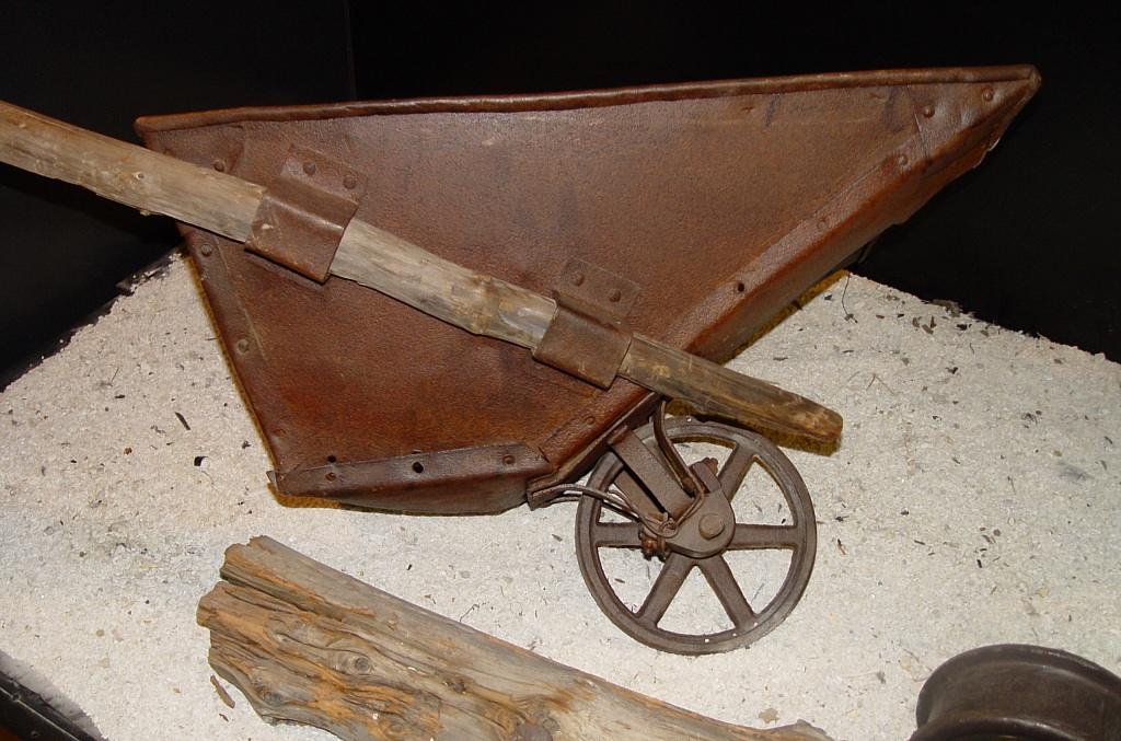 Тачка - основной "механизм" заключённого. Из экспозиции Магаданского областного краеведческого музея, 2010 г.